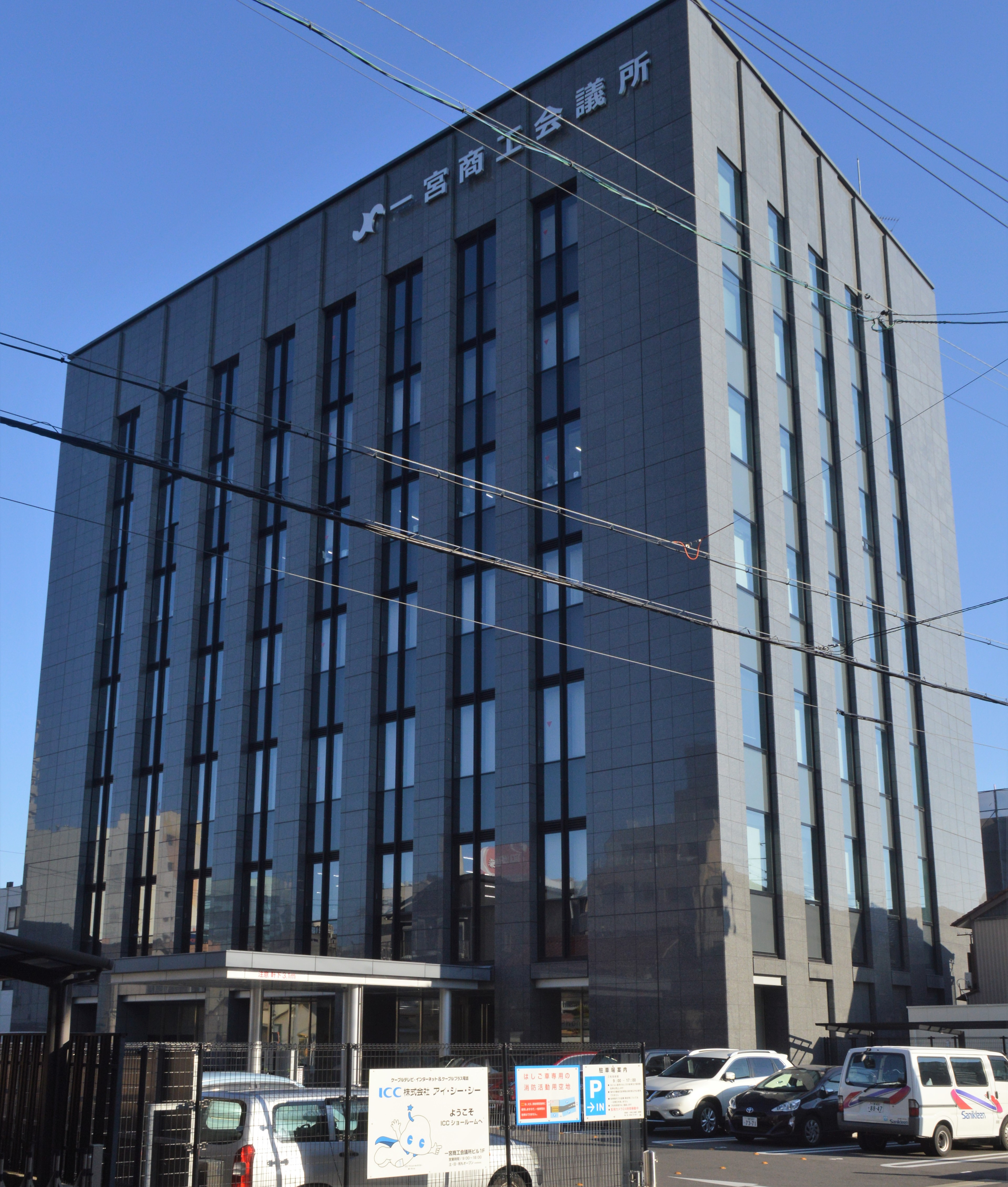 愛知県一宮市の一宮商工会議所ビル。